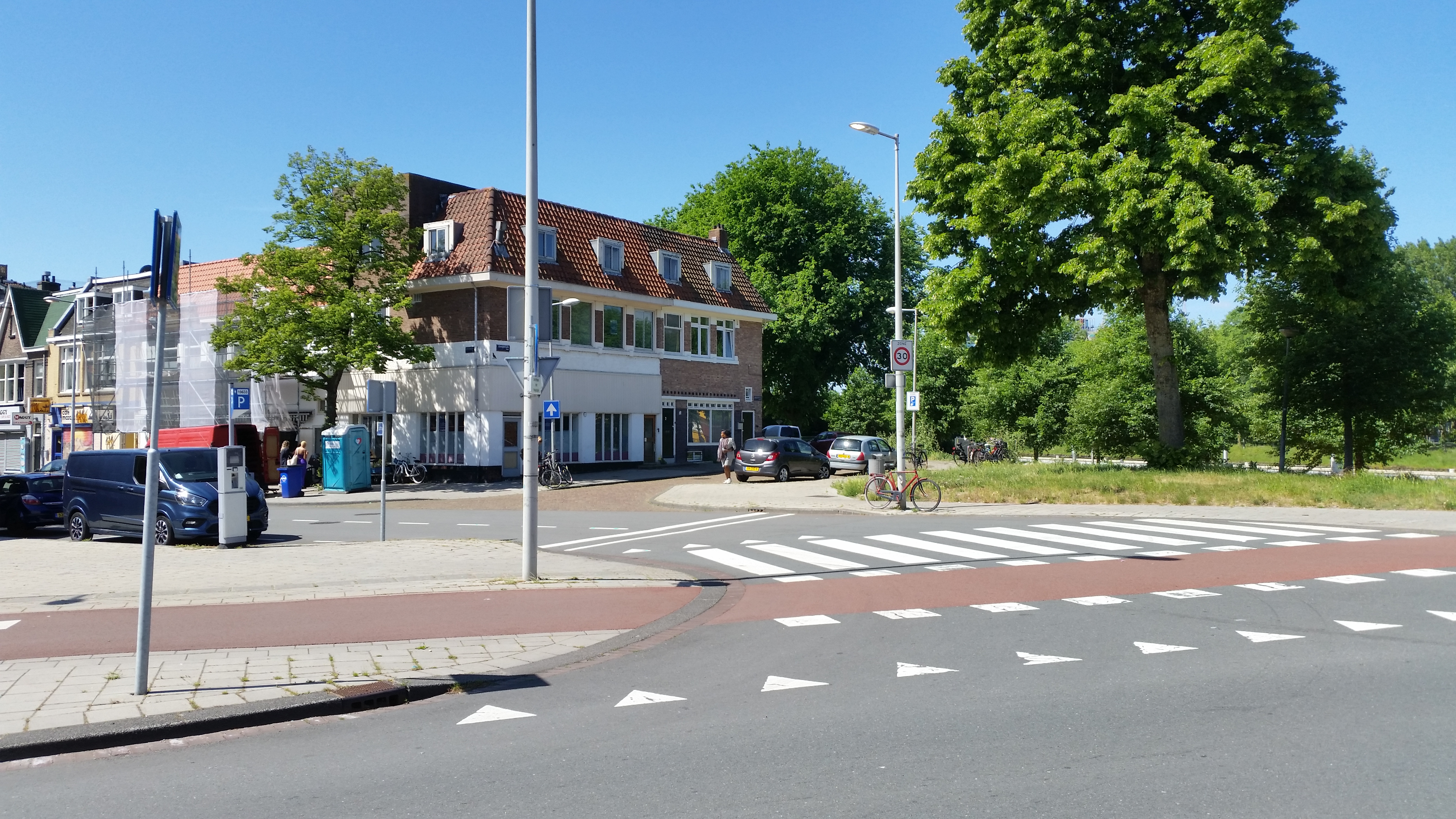 Impressie van het Kraaienplein, Amsterdam-Noord (mei 2020)